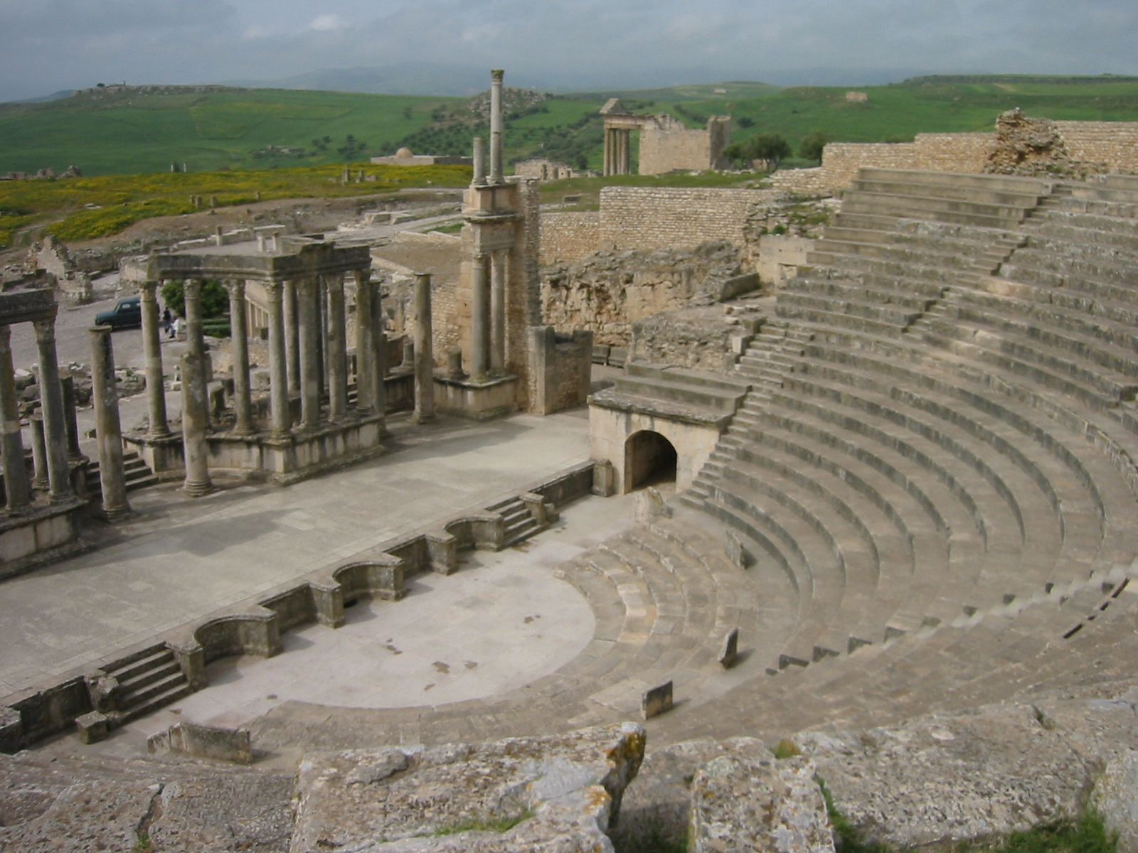 Theater in Thougga, Tunesien